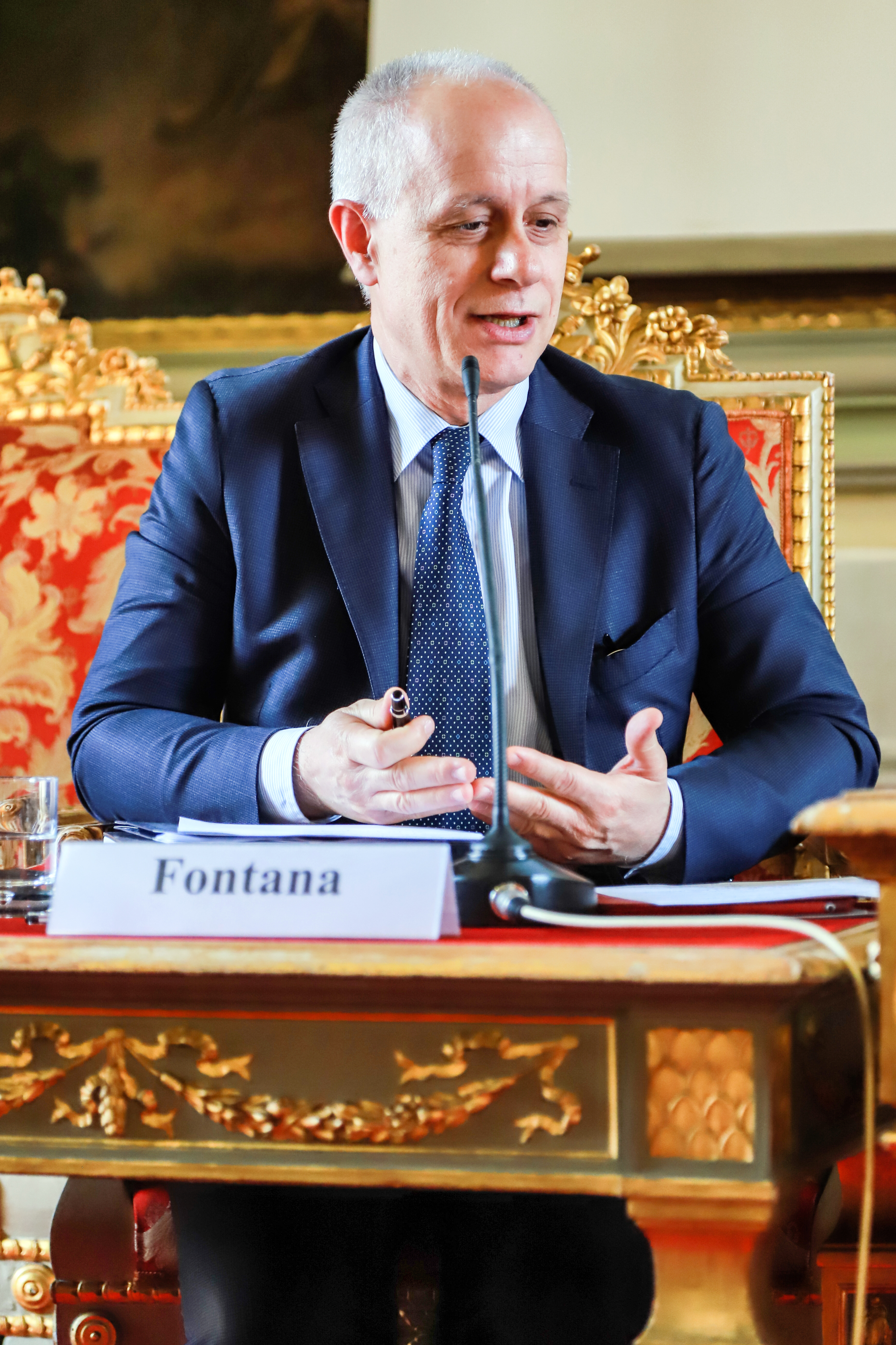 Luciano Fontana, direttore del «Corriere della Sera», ha presentato lo scorso 19 giugno in aula Foscolo il suo ultimo libro “Un paese senza leader” (Longanesi). Con lui hanno dialogato il Prof. Fabio Rugge, Rettore dell’ateneo pavese e storico delle istituzioni politiche, e il Prof. Salvatore Veca, filosofo e docente di Filosofia politica allo IUSS. Nell’aula storica è intervenuto anche Roberto Maroni, già governatore della Lombardia e ancora prima Ministro degli Interni e Ministro del Lavoro. L’occasione è stata anche quella per presentare la nuova “Scuola di pragmatica politica”.